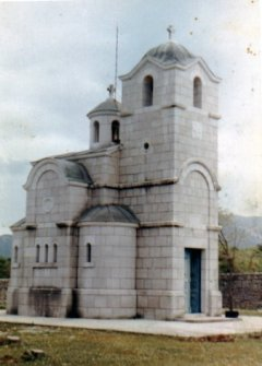 Pravoslavna crkva svetog proroka Jeremije u Začuli.Crkva više ne postoji-Srušila ju je Hrvatska vojska 1992. godine.